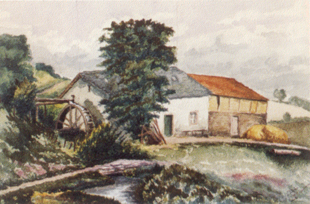 Diänjer Millen 1933